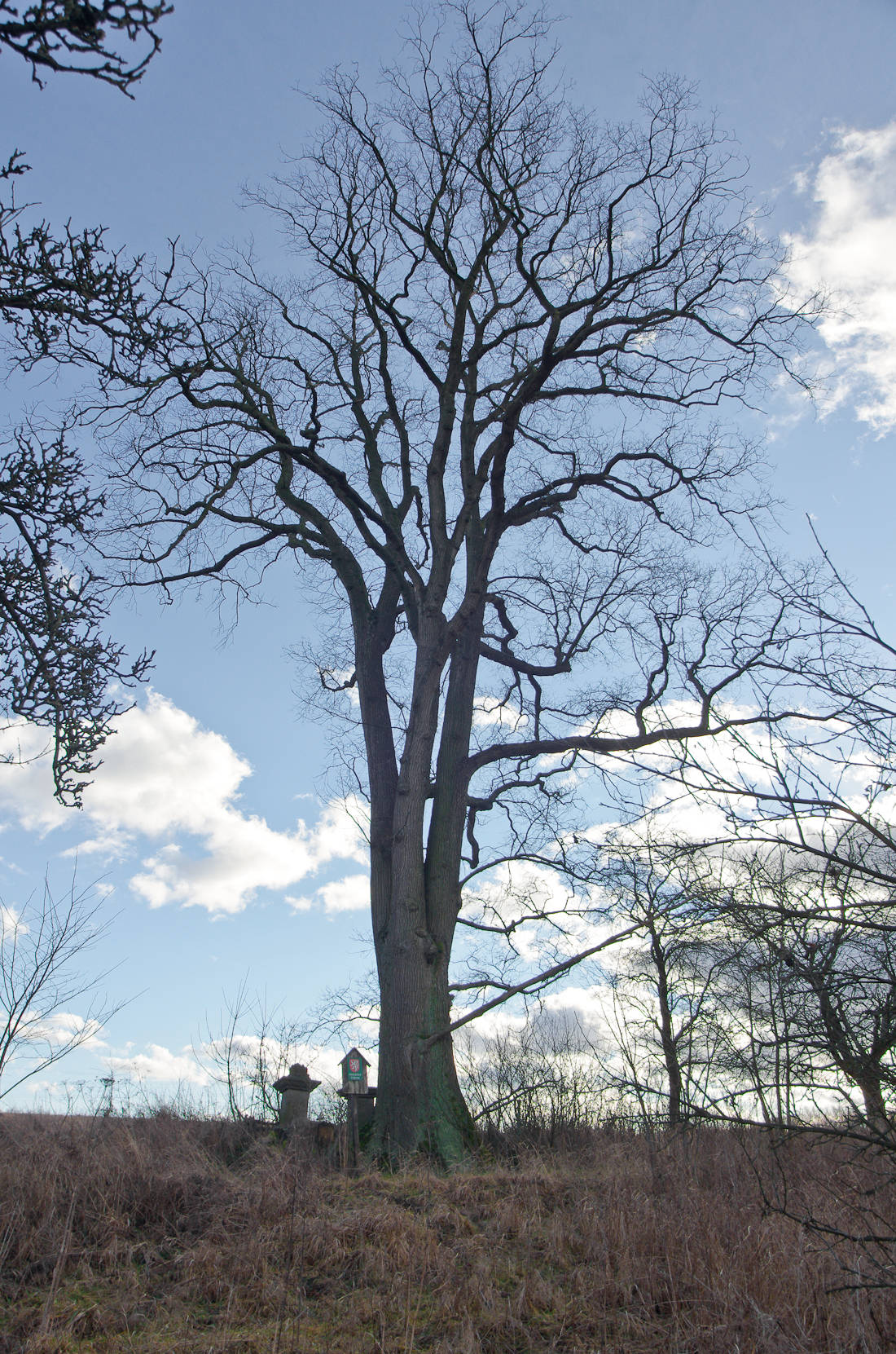 dříve památný strom Jilm u Hřeben, okres Sokolov, roste při staré cestě z obce Hřebeny do Krajkové, právní ochrana stromu byla zrušena v roce 2013